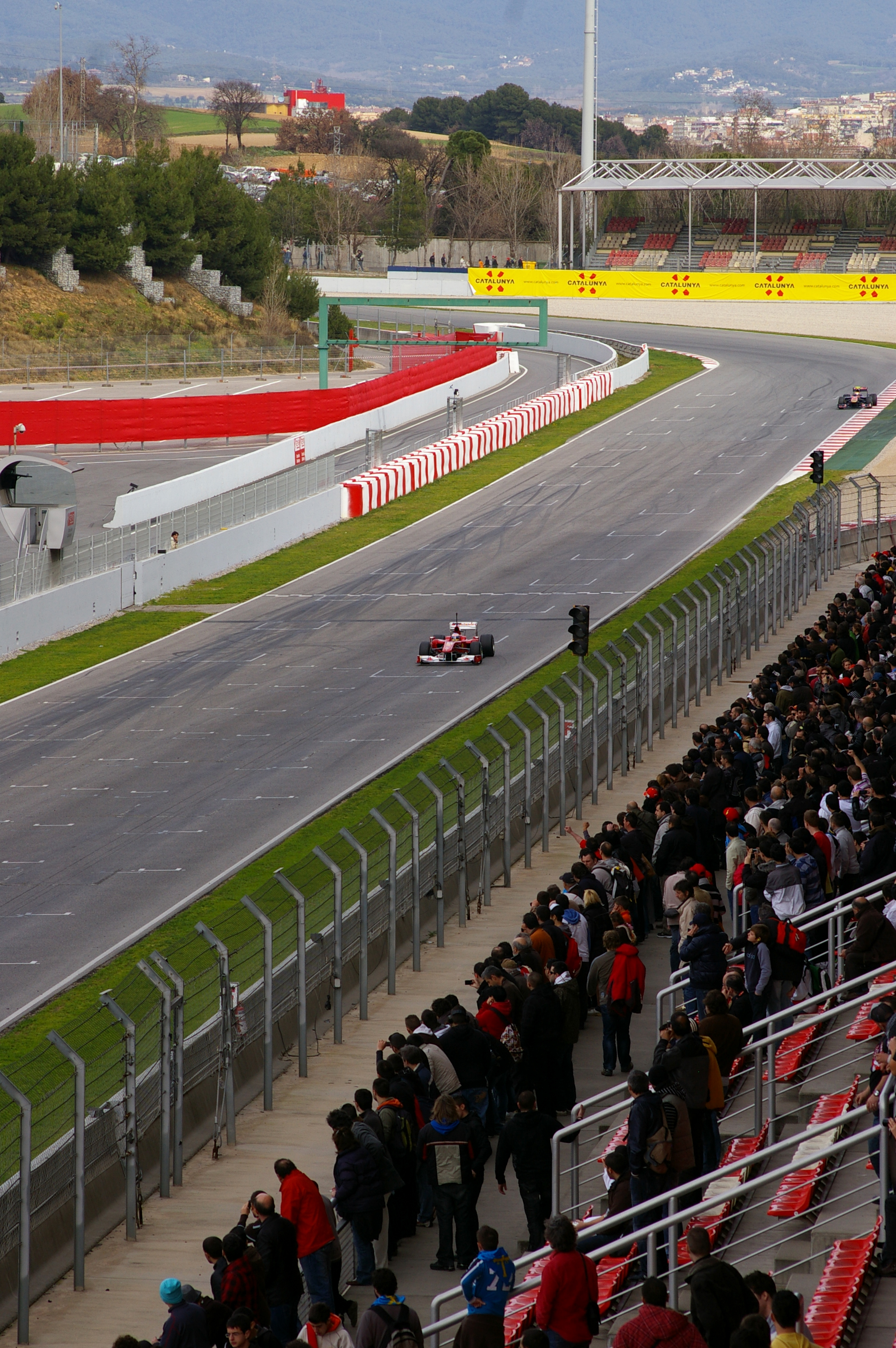 Entrenaments al Circuit de Catalunya.